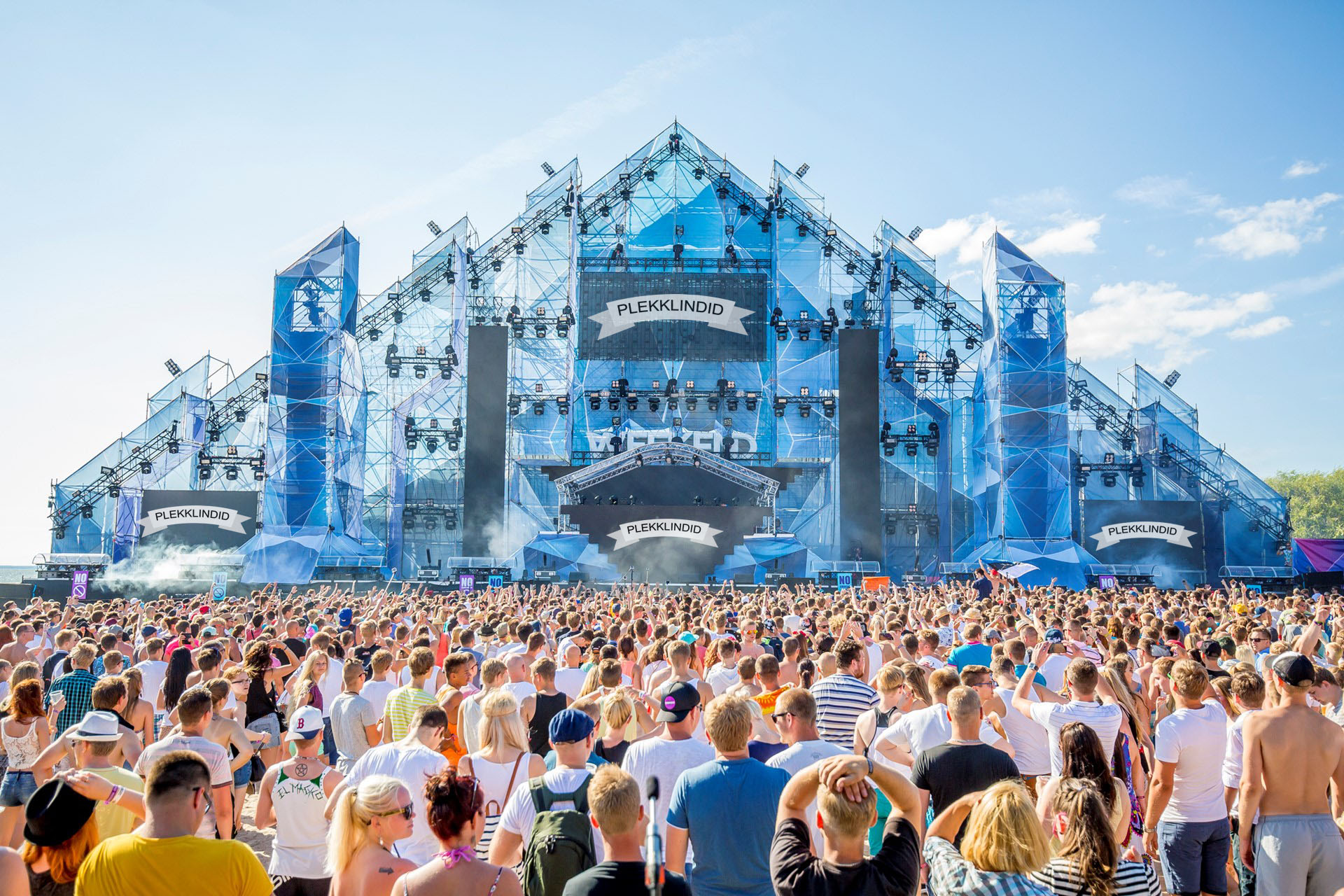 Plekklindid Weekend Baltic festivalil Pärnus 2016